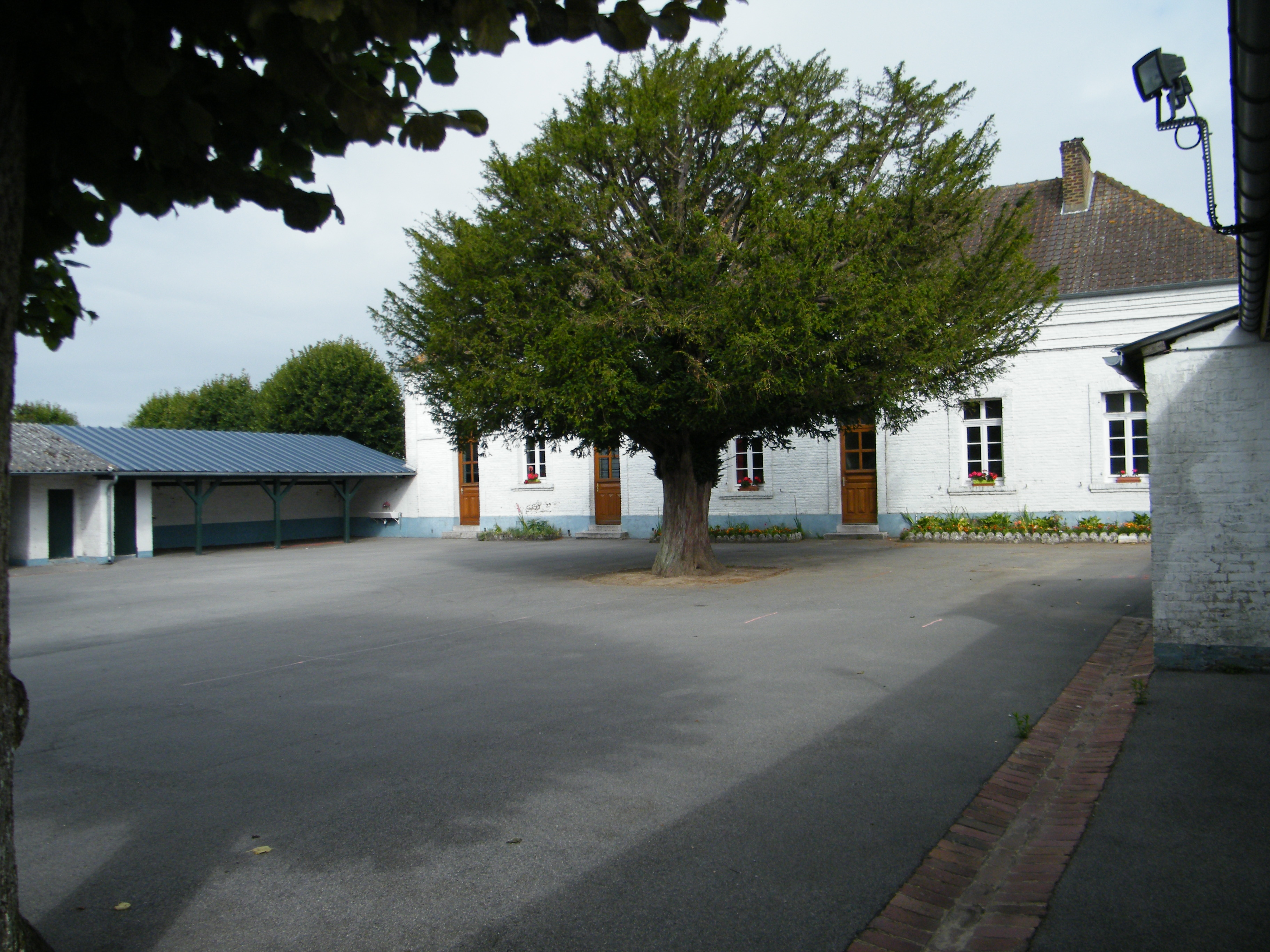 Nempont (Pas-de-Calais, Fr), école